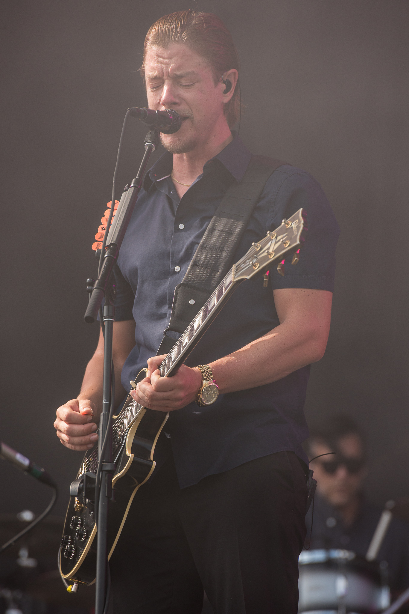 ARGO-Konzerte,Festival,Interpol,Konzert,Livekonzert,Livemusik,Musik,Paul Banks,RiP,Rock im Park 2015,Seat Zeppelin Stage